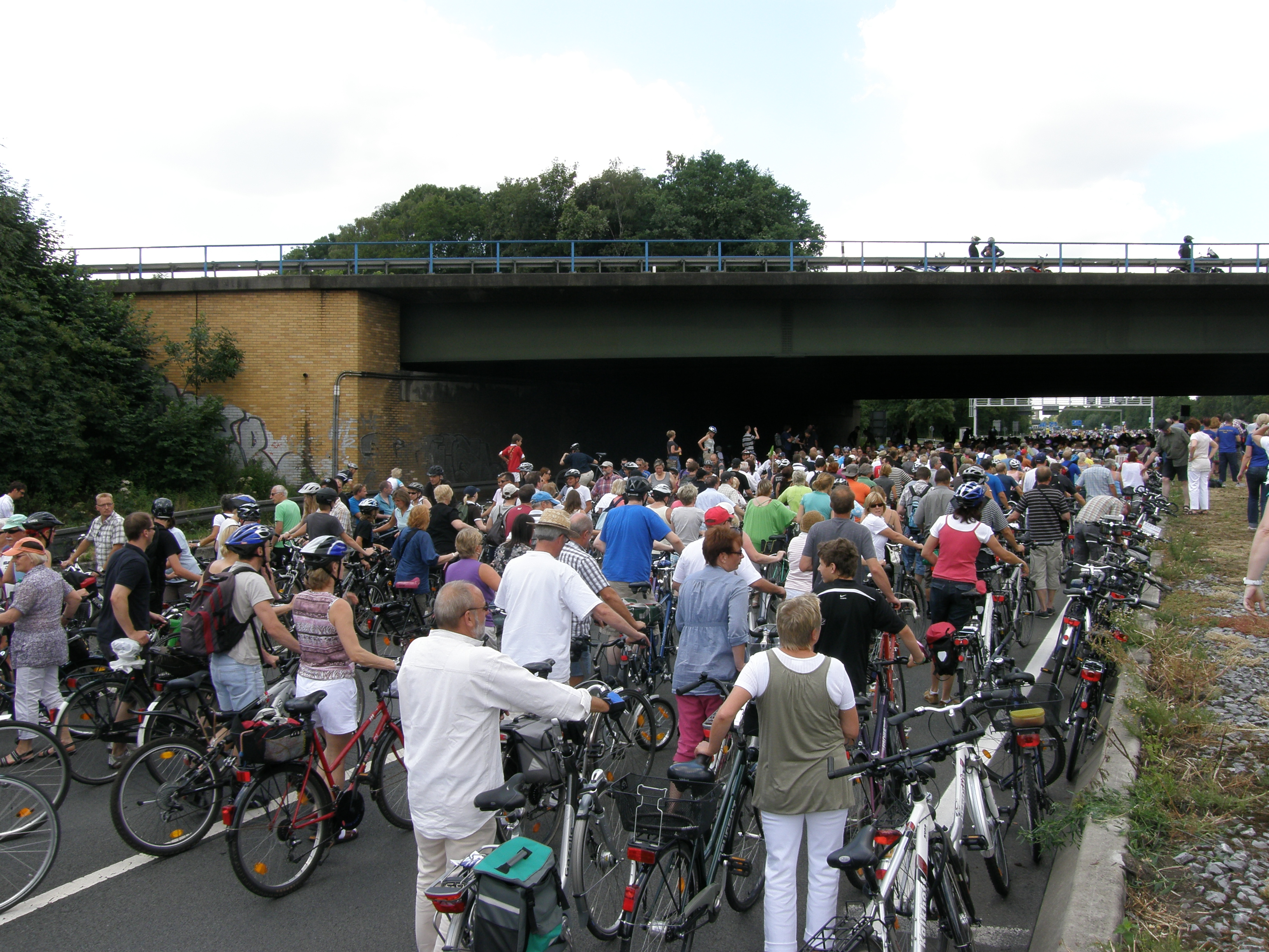 Still-Leben Ruhrschnellweg, Standort Bochum-Harpen